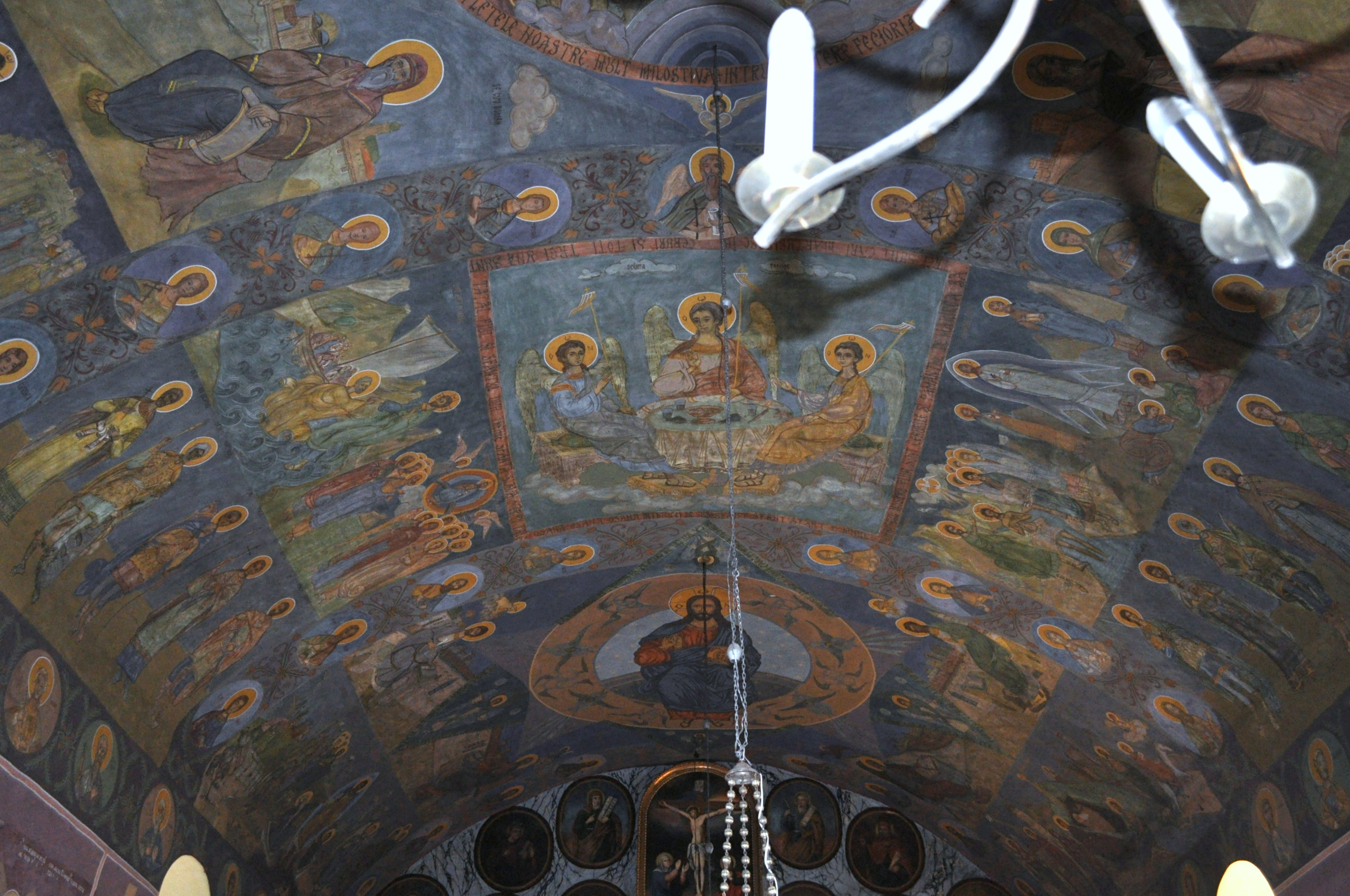 Biserica „Naşterea Născătoarei de Dumnezeu" din Hălmagiu, județul Arad